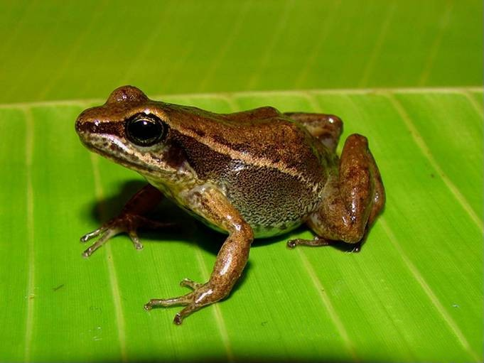 Colostethus fraterdanieli